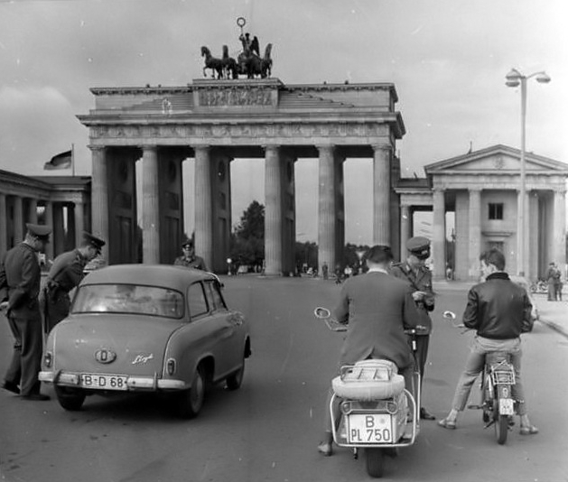 Note: This description has been identified as biased or incorrect: Der Text (Beispiel: "Frontstadtpropaganda") entspricht dem Geist und Vokabular des seinerzeitigen DDR-Regimes, ebenso die Verwendung der Bezeichnungen "Westberlin" statt "West-Berlin" und "DDR-Hauptstadt" anstelle von "Ost-Berlin".. ADN-ZB-Hesse-13.8.1961-Berlin: Sicherung der Staatsgrenze am 13.8.1961. Zahlreiche Westberliner Bürger ließen sich durch die Frontstadtpropaganda nicht von einem Besuch der DDR-Hauptstadt Berlin abhalten und passierten am 13.8. die für den Übergang eingerichteten Kontrollstellen. Nach der Kontrolle am Brandenburger Tor (unser Foto) kehren die Besucher nach Westberlin zurück.